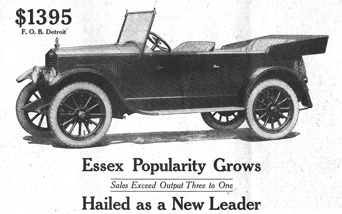 1919 advertisement for Essex automobile